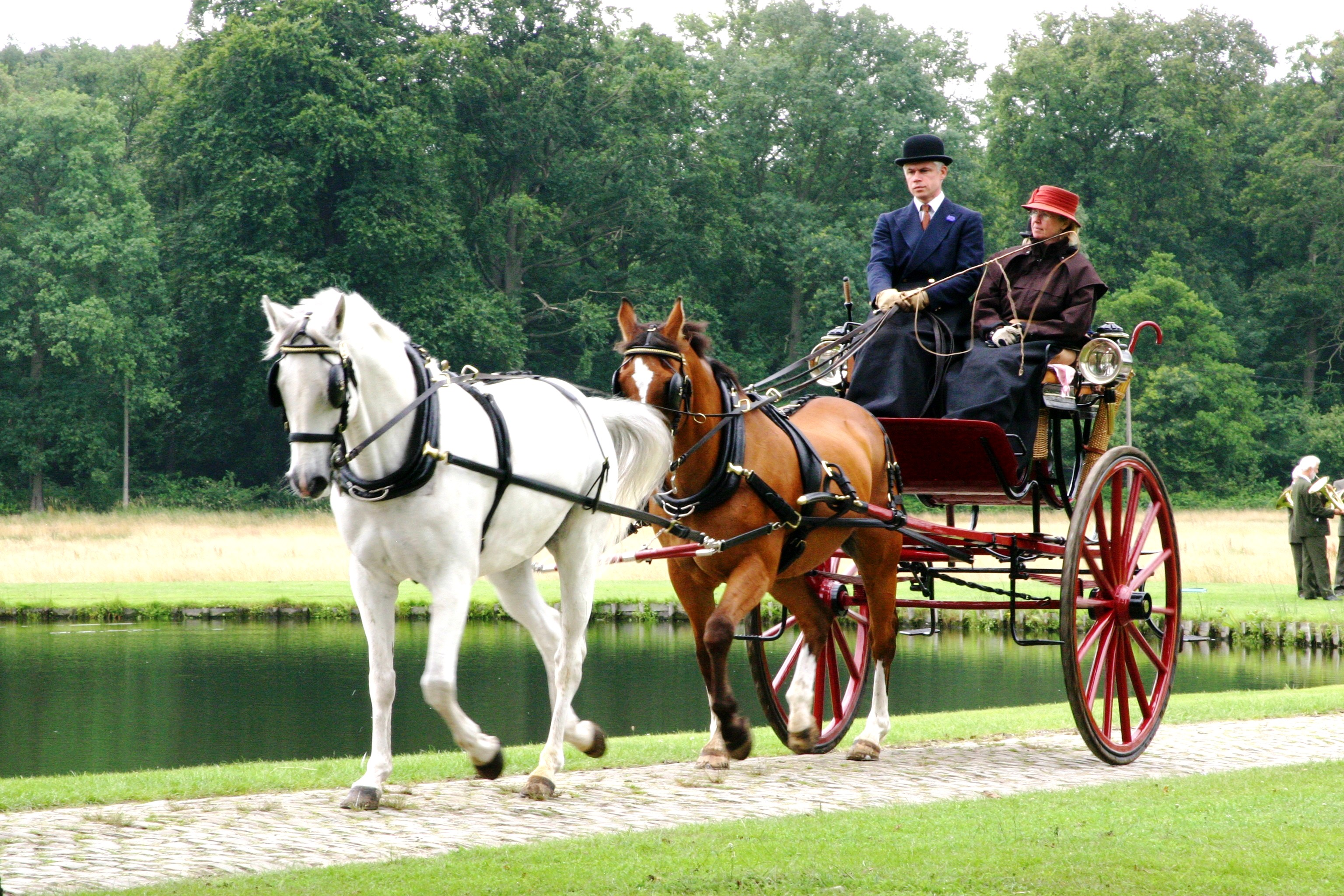 E Skeleton-Tandem-Cart.